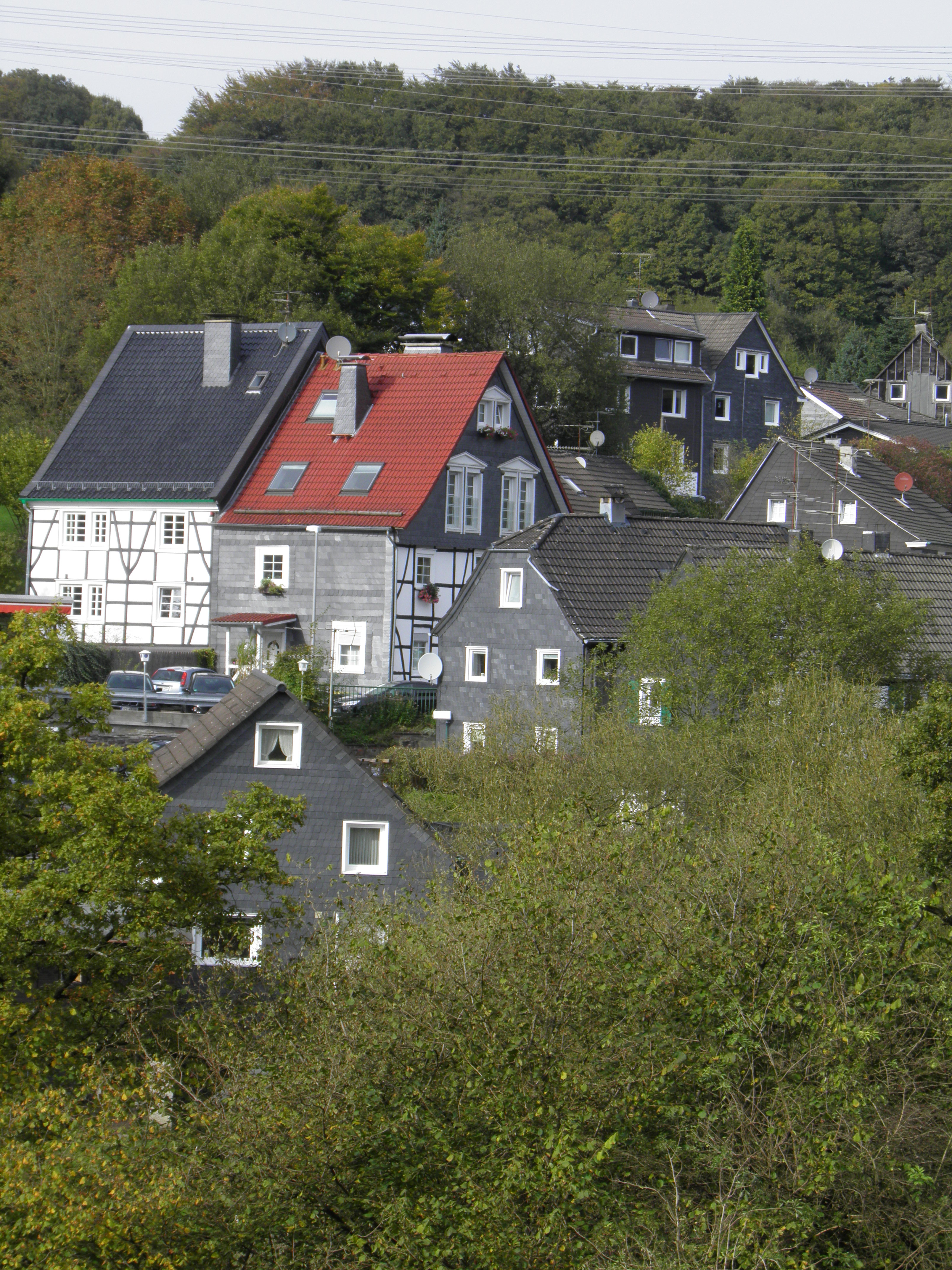 Häuser in Grund in Remscheid/Lüttringhausen